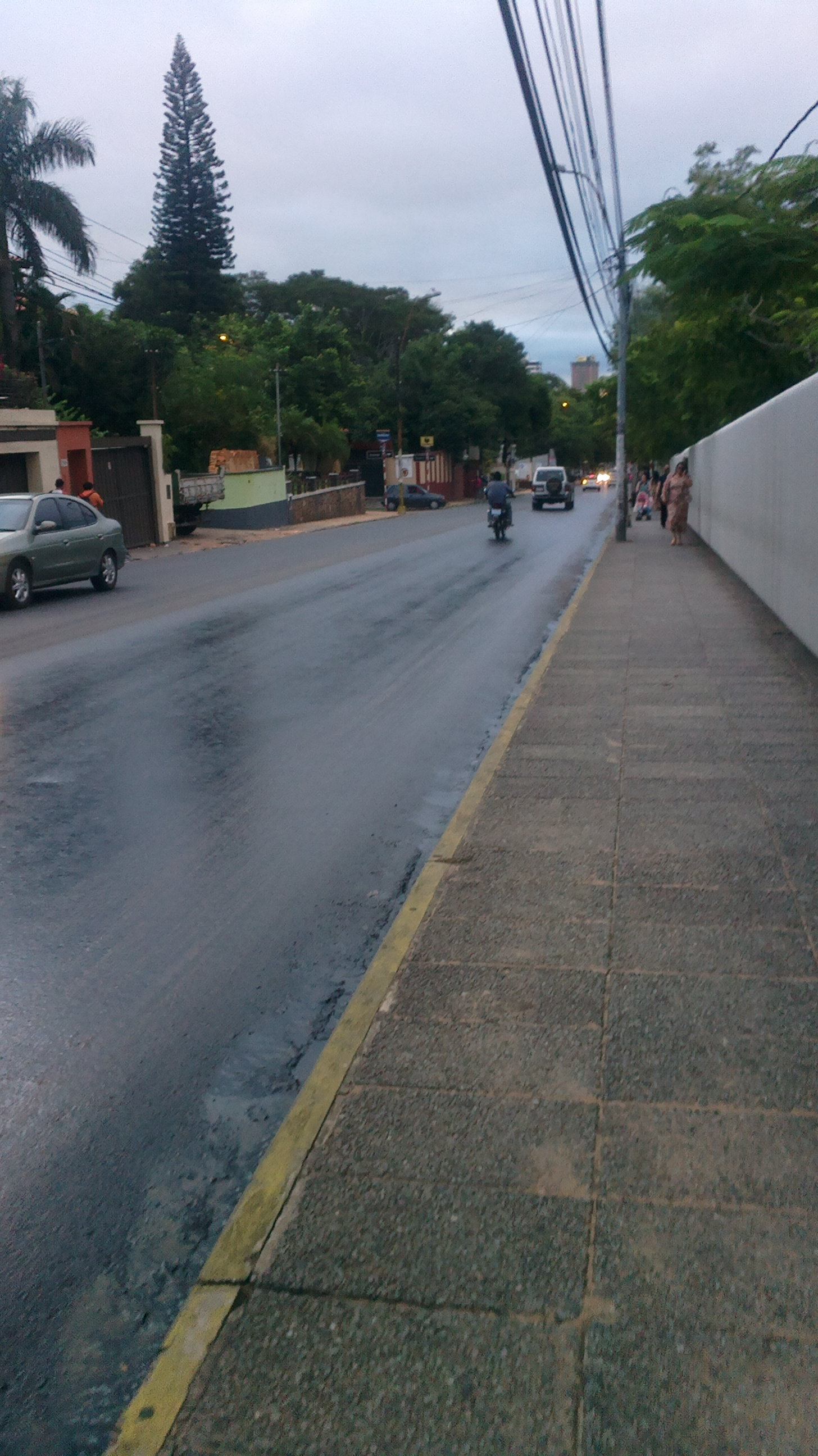 Avenida España, Asunción, Paraguay